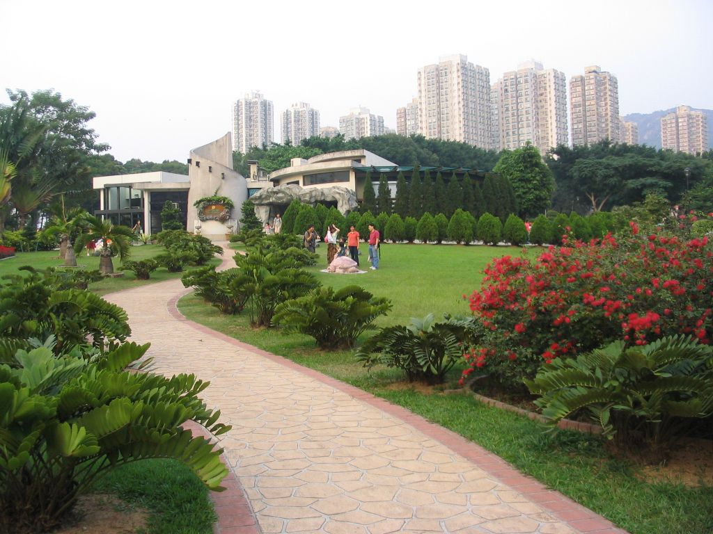 屯門公園(Tuen Mun Park)